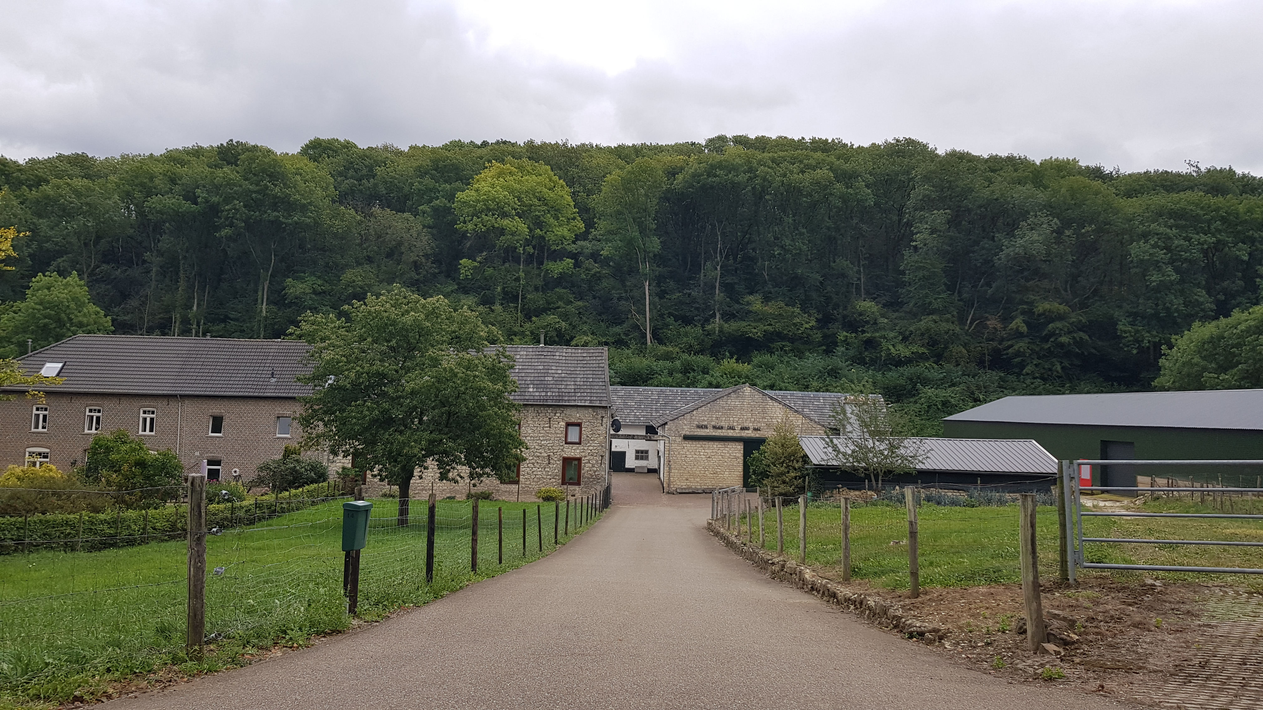 Hoeve de Daal, Ubachsberg, Nederland